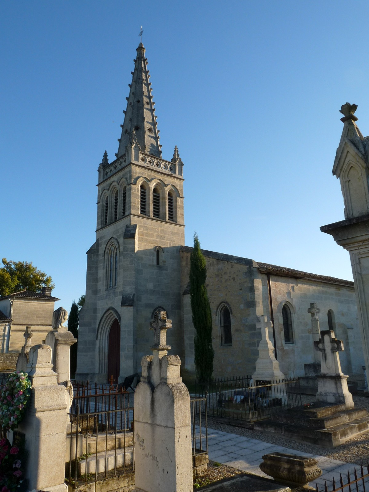 Eglise de Lapouyade, Gironde, France